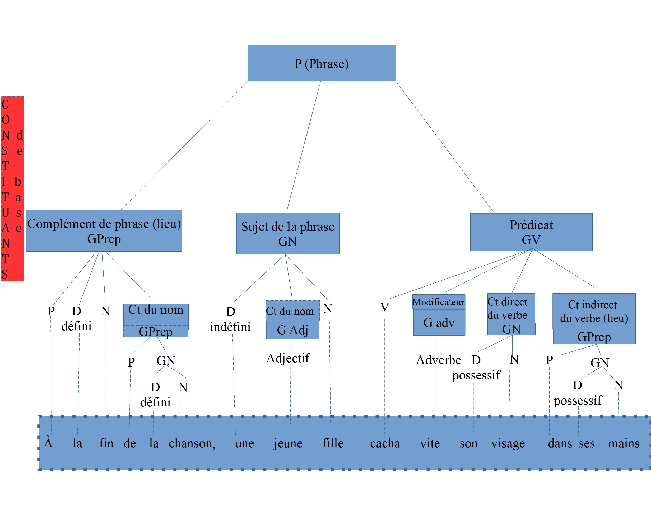 Nouvelle syntaxe : Représentation graphique des relations des groupes de mots et des mots à l'intérieur de la phrase.